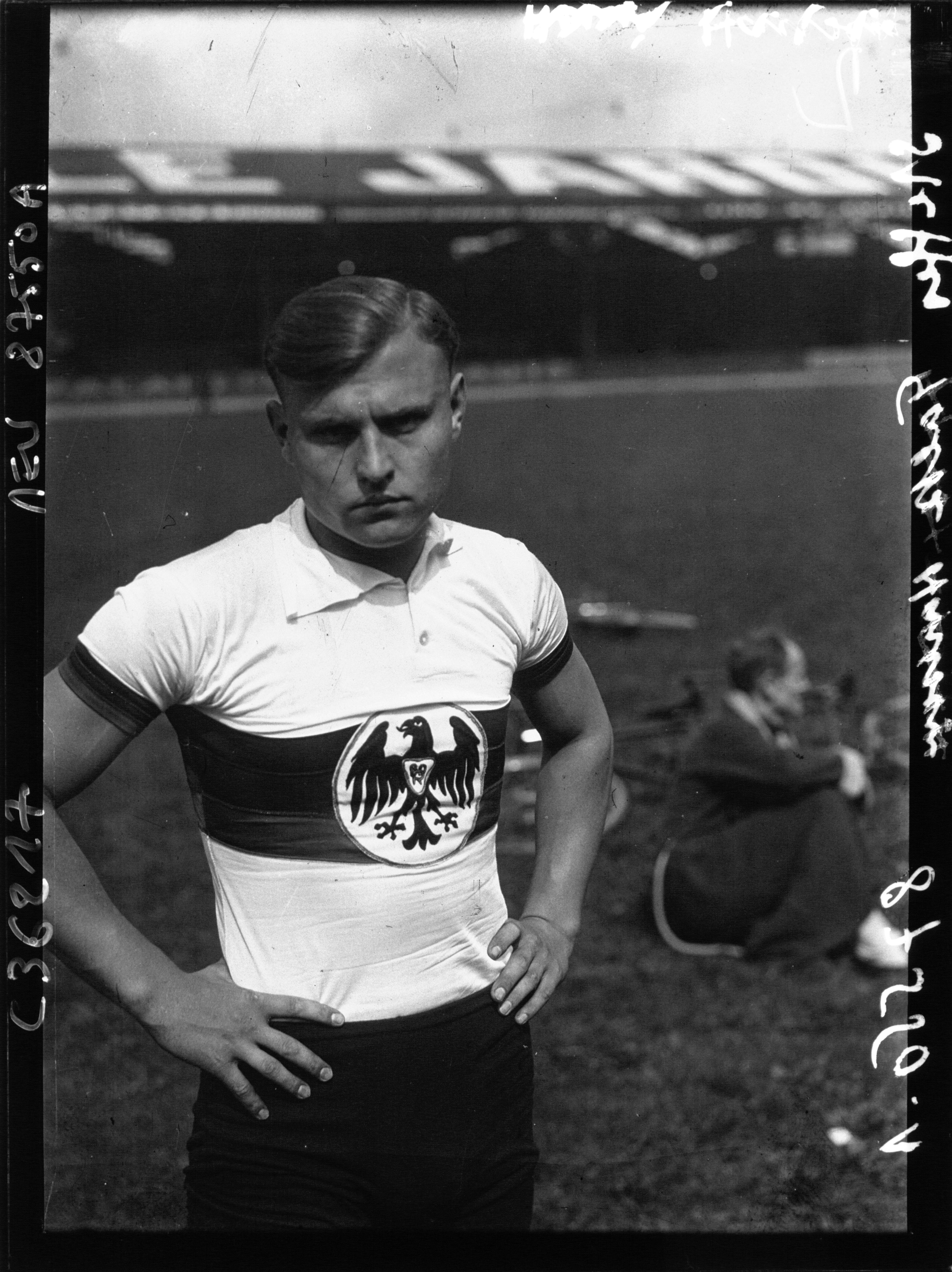 Peter Steffes, German cyclist, lors du Grand Prix de l'U.V.F. en 1931